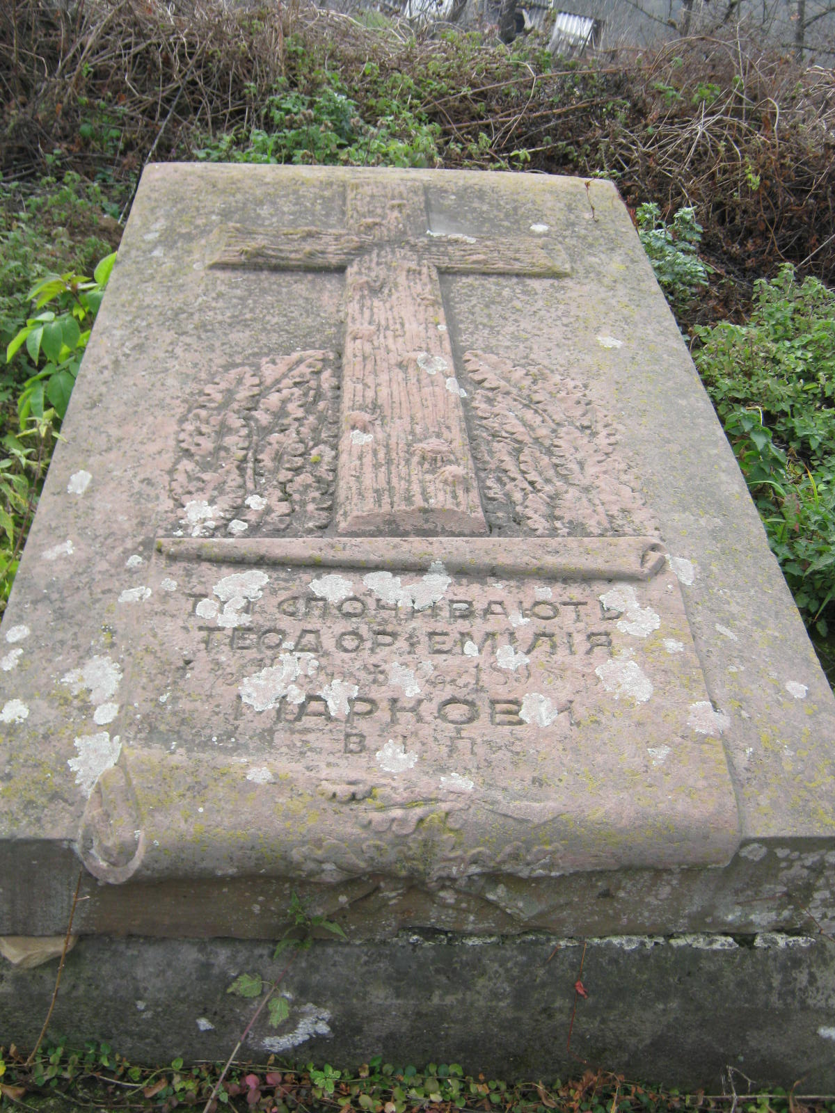 Могила судді Теодора Маркова та дружини, Міський цвинтар, Бучач, Тернопільщина, Україна